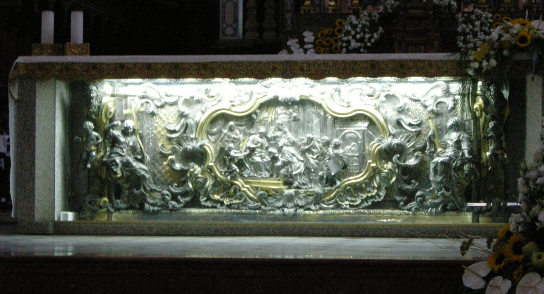 Messina, cattedrale, interno